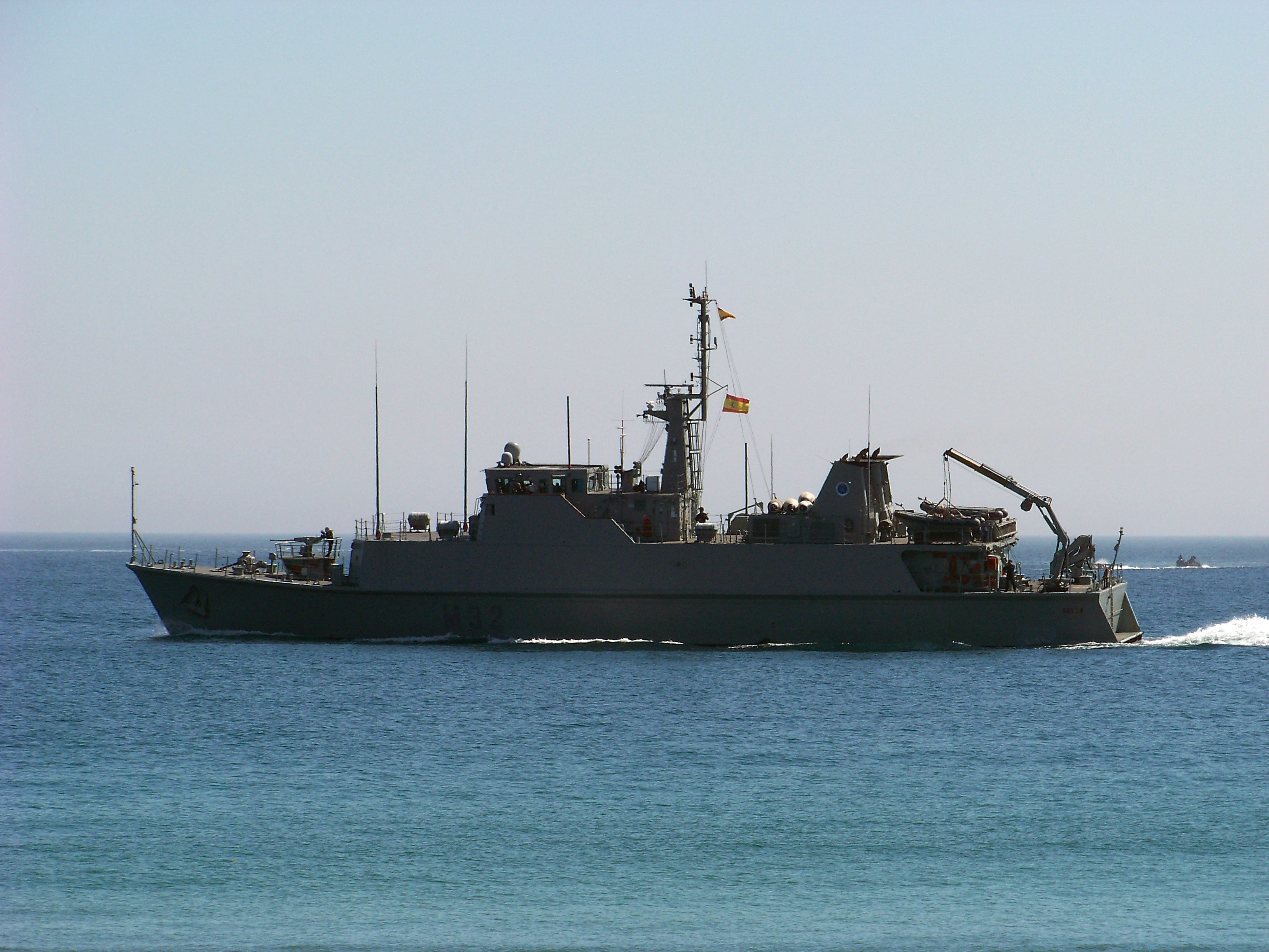 Cazaminas M-32 Sella, de la Clase Segura, durante la exhibicion aeronaval realizada en Santander con motivo de la celebracion del dia de las Fuerzas Armadas